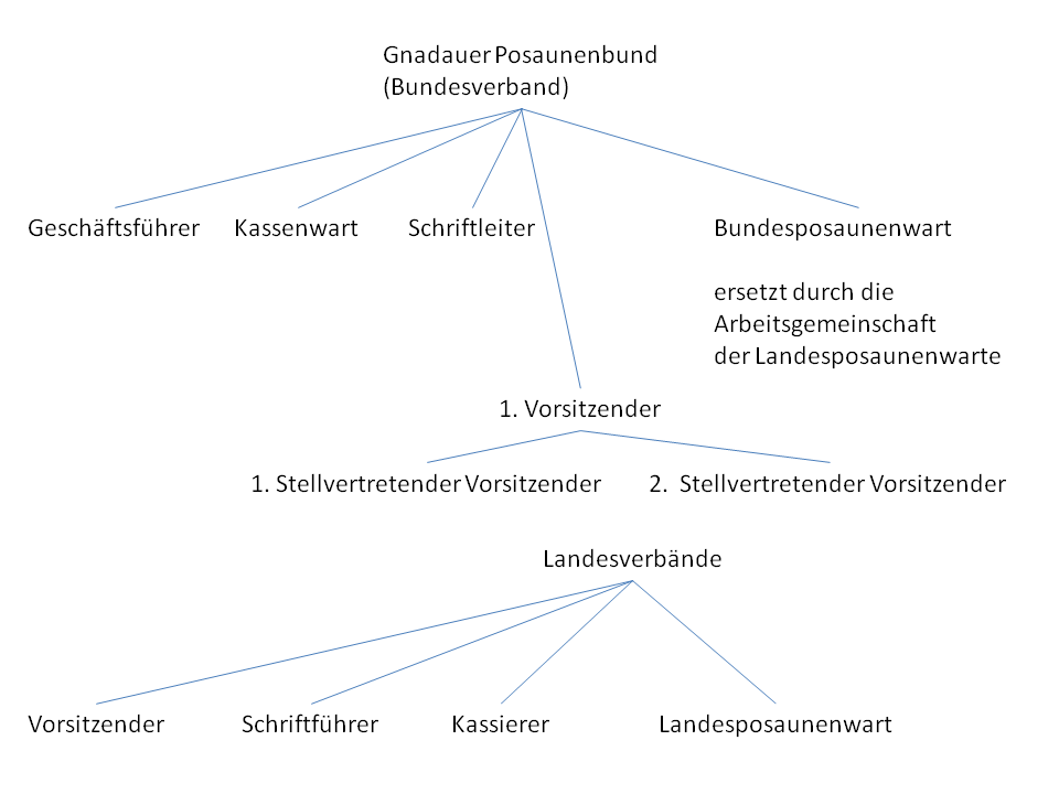 Struktur des Gnadauer Posaunenbundes